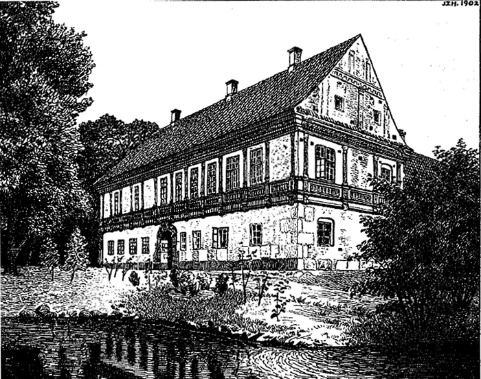 Brejninggaard i Brejning Sogn ved Spjald i Vestjylland, midt mellem byerne Ringkøbing, Skjern, Herning og Holstebro.